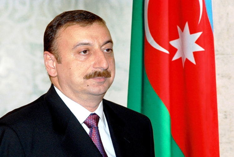 Prezident İlham Əliyev